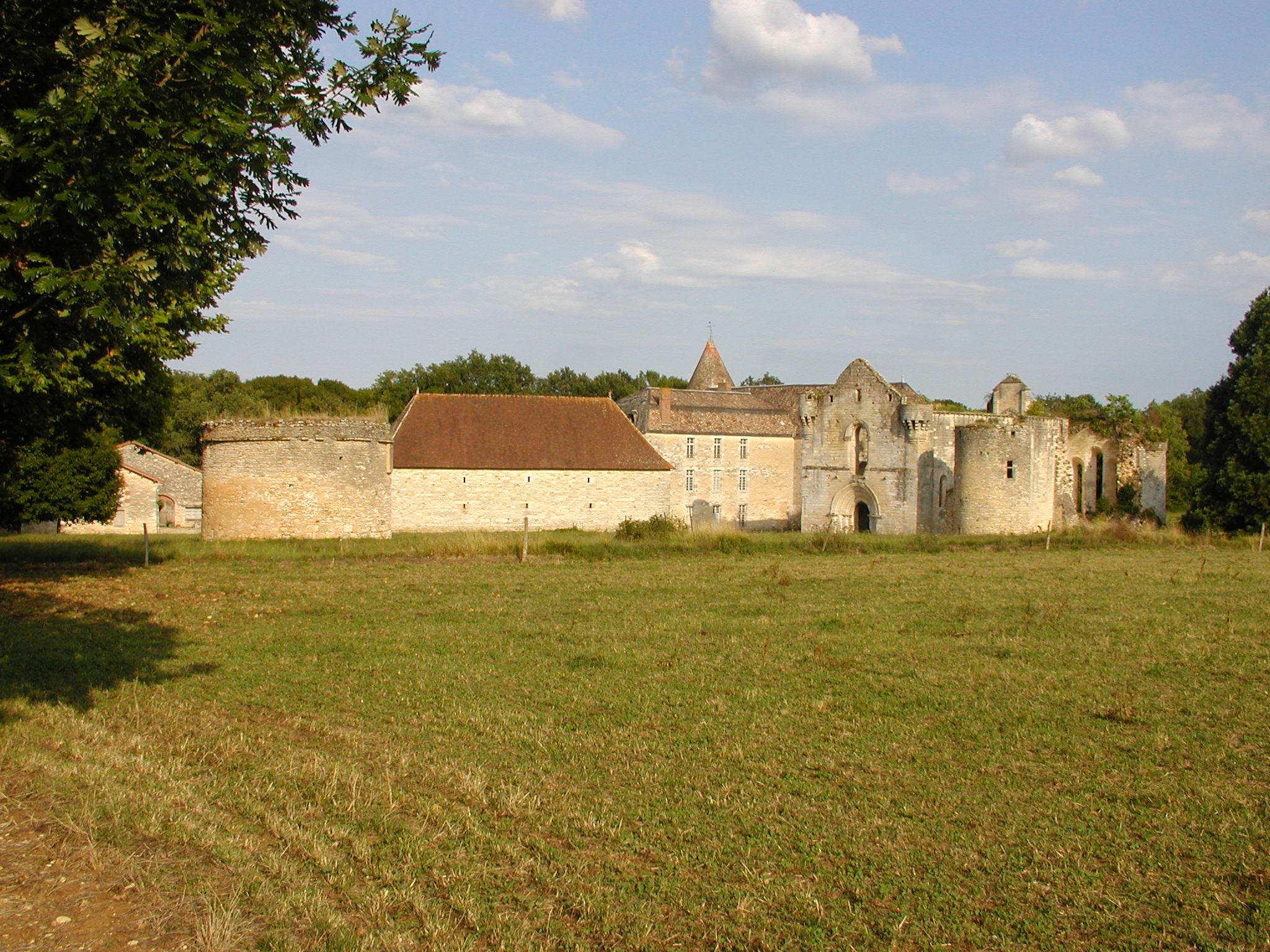 vue générale de l'abbaye Notre-Dame de La Réau, Saint-Martin-L'Ars (86), France